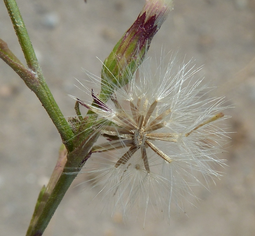 Aster squamatus (Matacavero, Pirulero, ...) : Frutos (cipselas) in situ - calle del Papa Juan Pablo III, circa Estación FF.CC., Águilas (Provincia de Murcia, España).